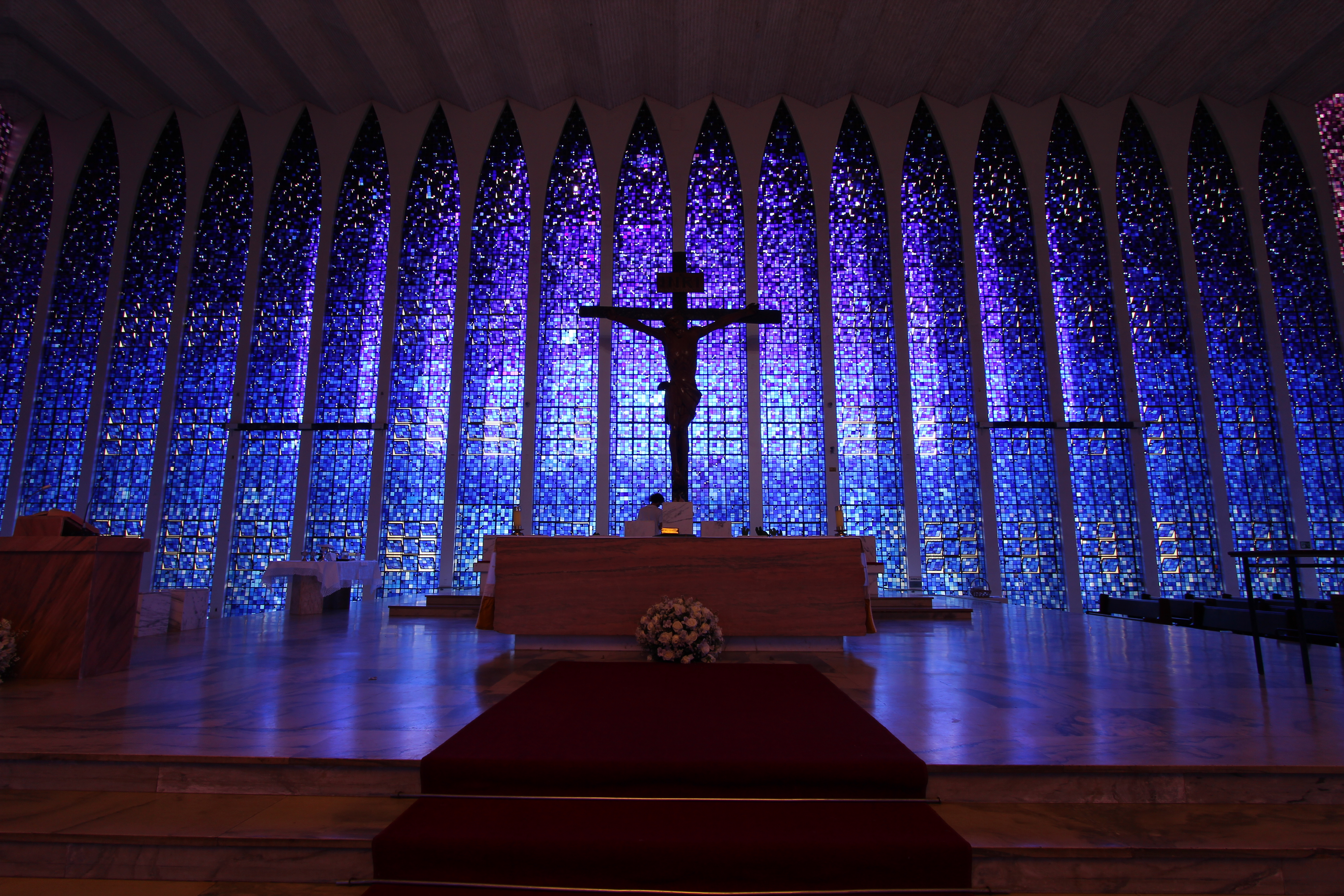 Santuário de Dom Bosco - Brasilia.